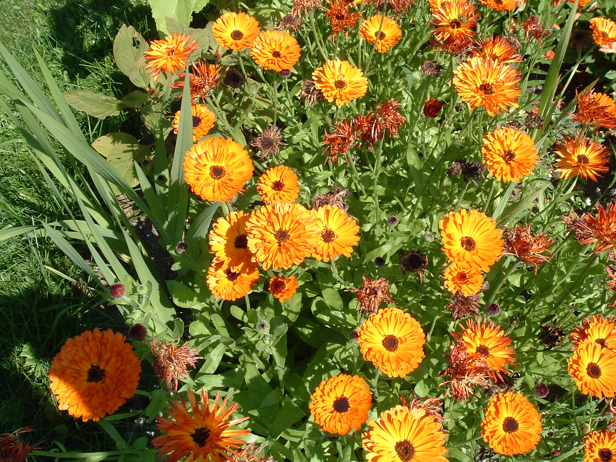 Cultivar de souci à fleurs cuivrées